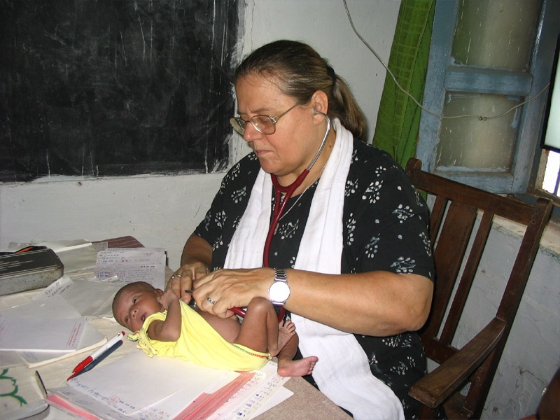 dr Helena Pyz w swojej przychodni